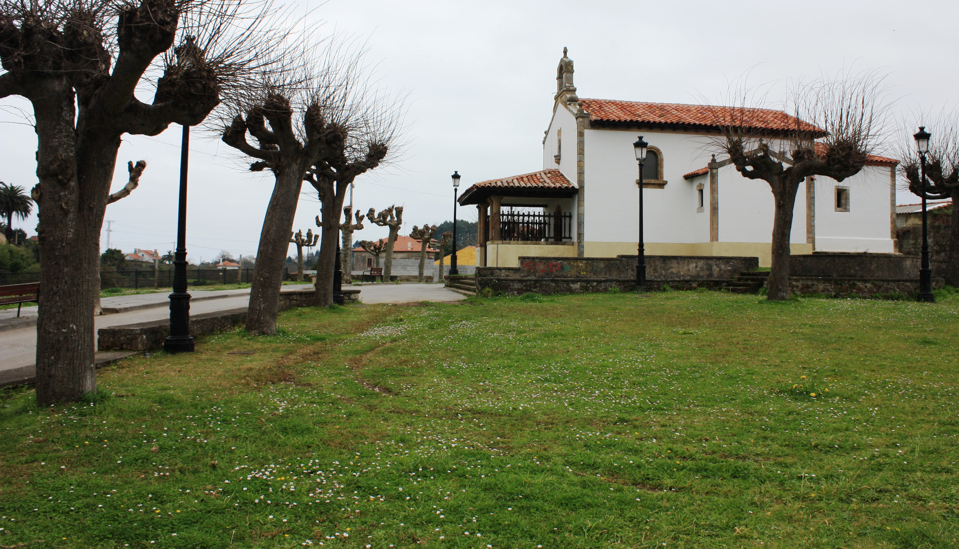 Santuario de Loreto en Colunga-Asturias